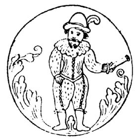 Jost Dunte pilt, mis pärineb Tallinna linnakaitseväe ülema ametikepilt